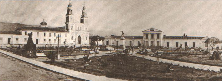 Parque Garcia Rovira de la ciudad de Bucaramanga